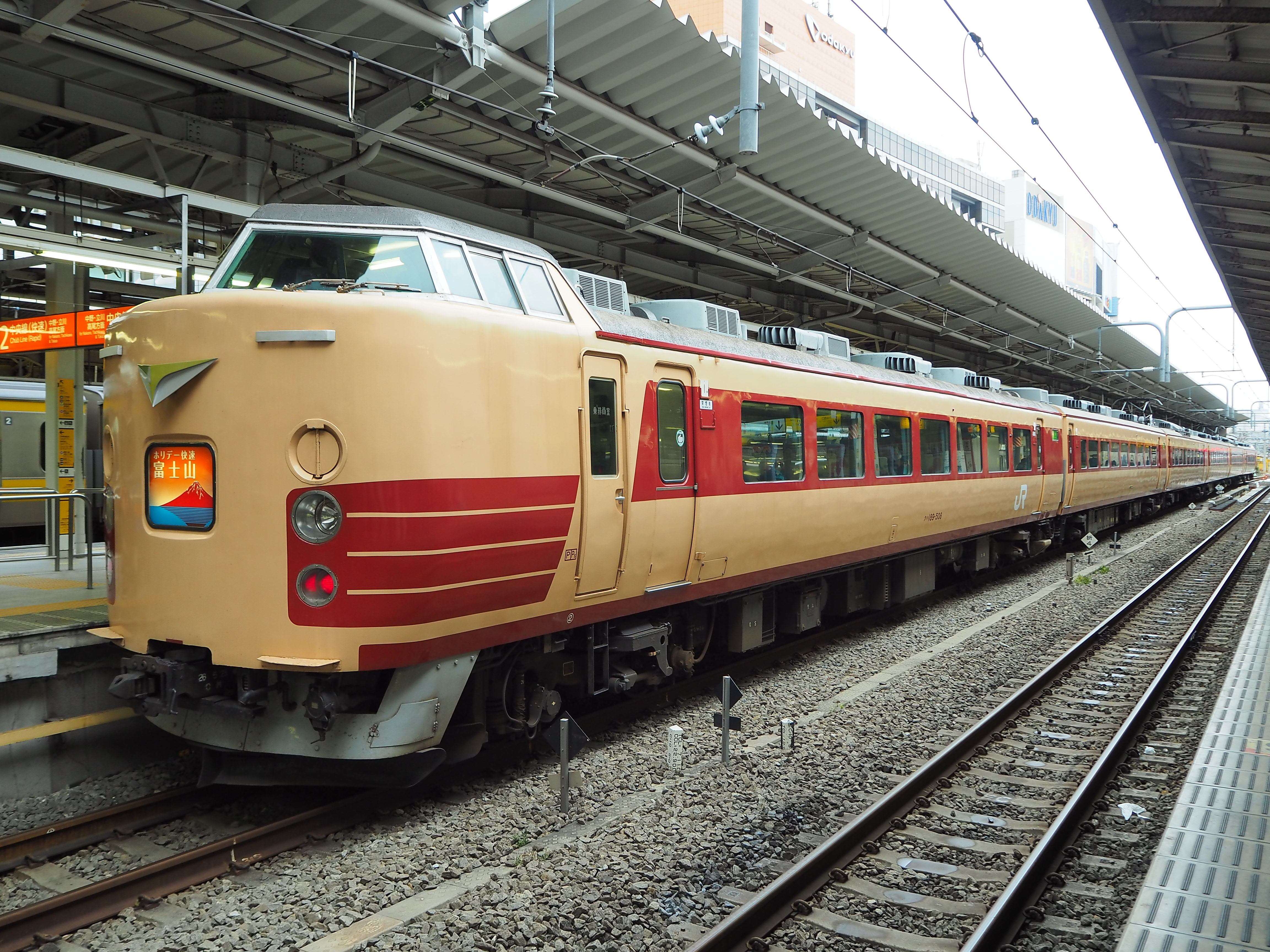 豊田車両センター所属の189系M51編成による、臨時快速ホリデー快速富士山号。この日が最終運行となった。